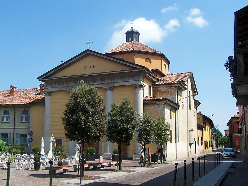 Pozzuolo Martesana - Chiesa Parrocchiale di S. Maria Nascente